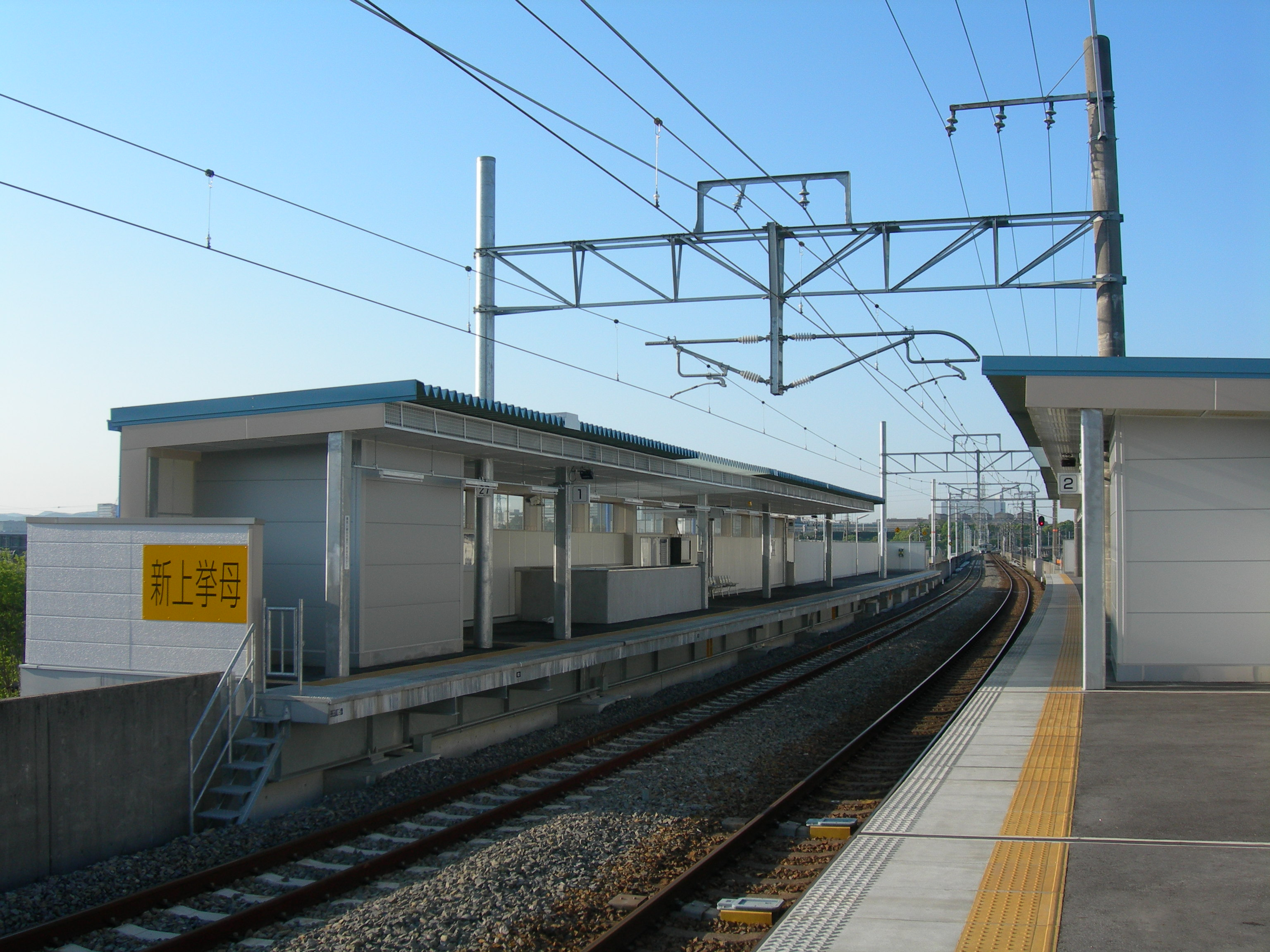 新上挙母駅プラットホーム